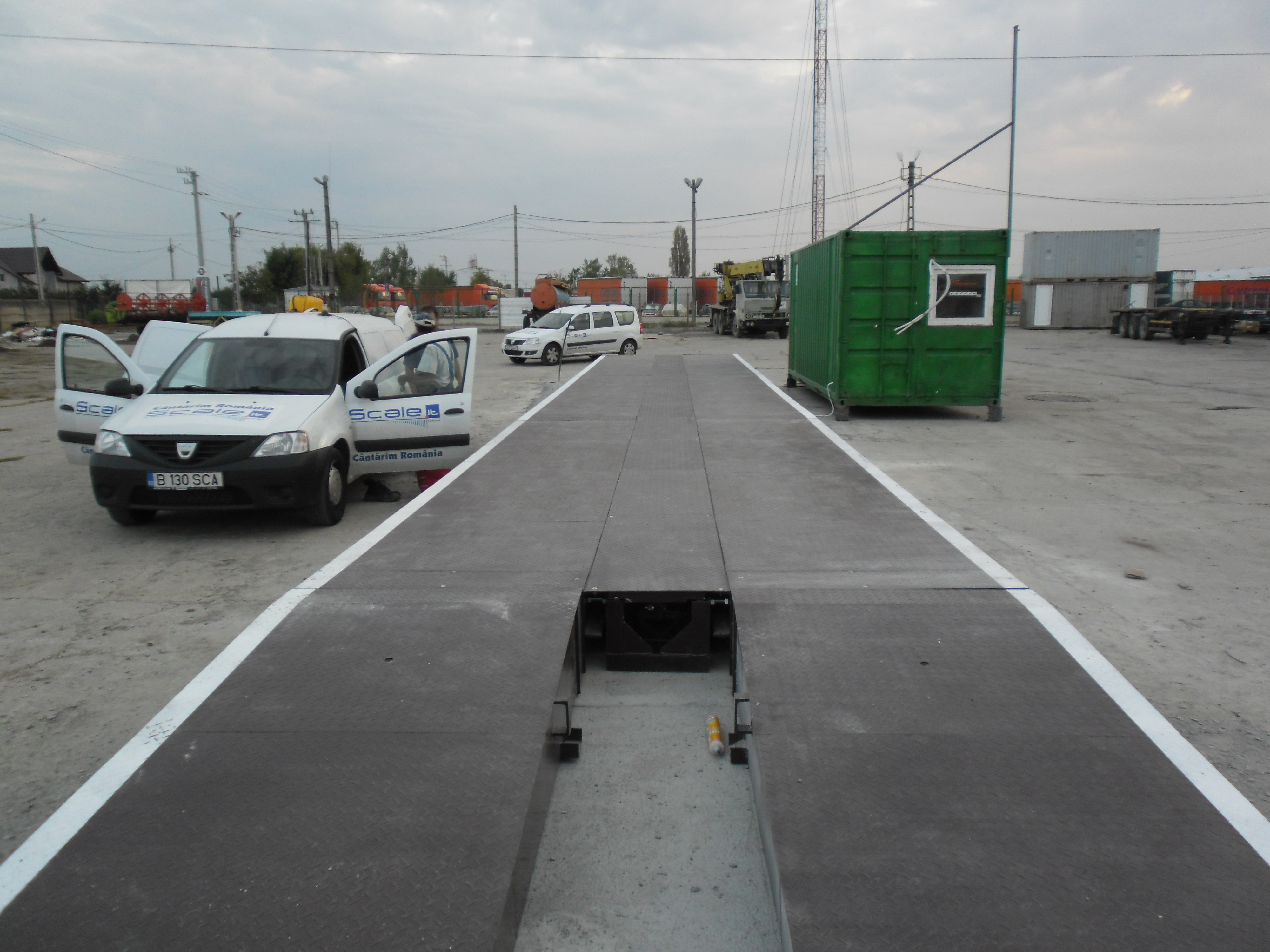 Cantar auto metalic instalat pe placa de beton